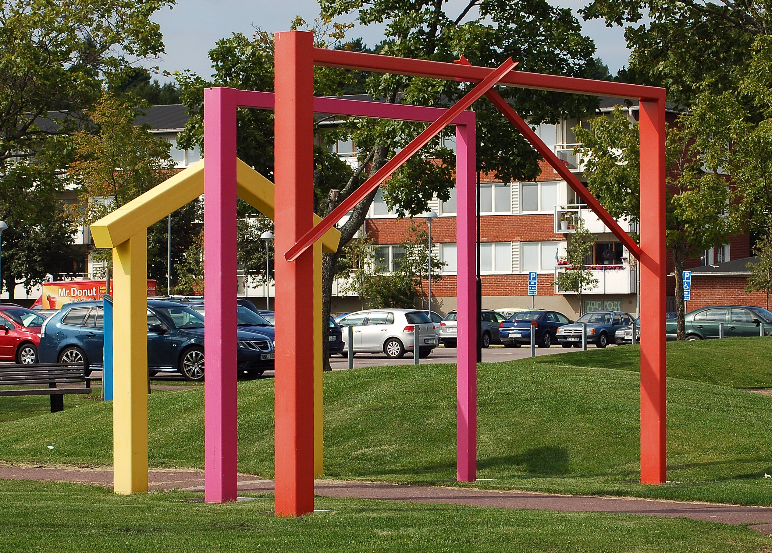 Vägen hem av Anna Kindgren och Carina Gunnars placerade på Hemvägen/Plintgatan Våxnäs, Karlstad.